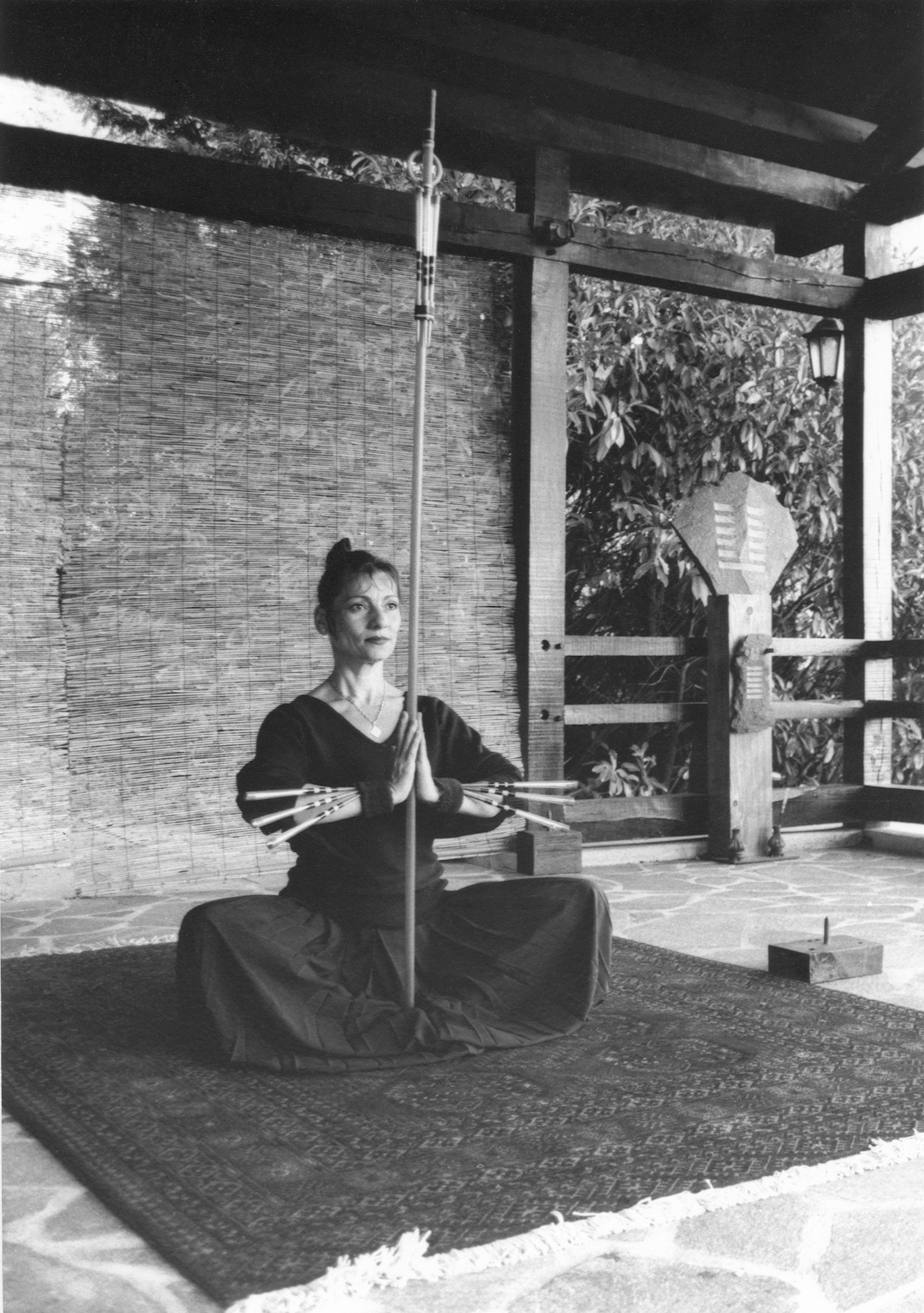 Jacqueline Dioptaz (4ème Dan Sarbacana)1997. Sarbacana est une technique, inventée en 1991 par Michel-Laurent Dioptaz, qui propose un nouvel usage de la sarbacane utilisée comme un instrument d’exploration et de développement des capacités d’attention et de prise de décision par la conscience du souffle. Parfaite symbiose entre la méditation et l'action. Pas de compétition.